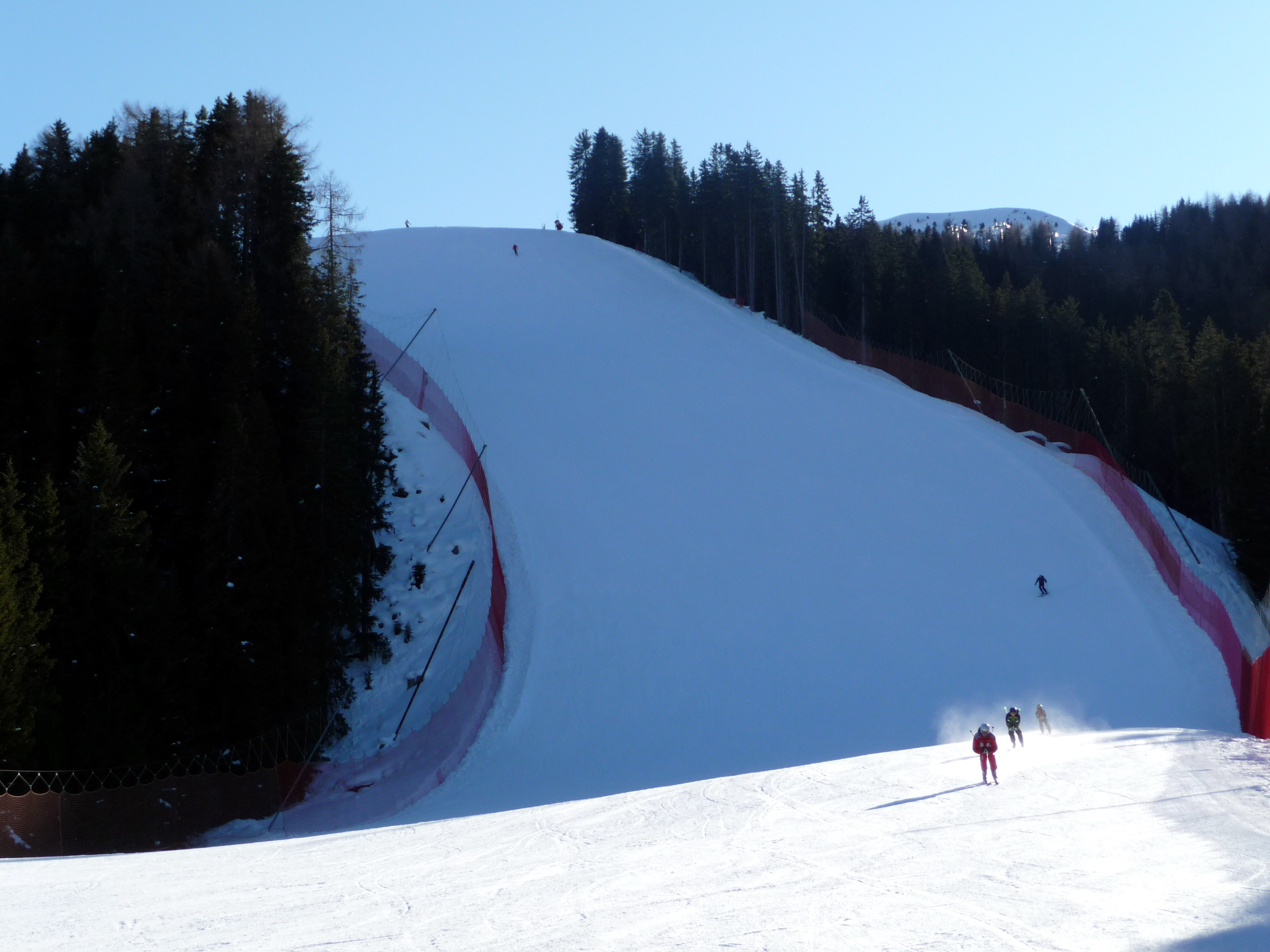 Pista nera Saslong, libera maschile